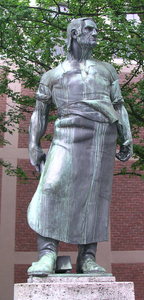 Aachen, Denkmal des Wehrhaften Schmieds (war eigentlich ein Metzger), der vom 16. auf den 17.3.1278 Graf Wilhelm von Jülich am Kölntor (in der Nähe der heutigen Schanz) mit einem Hammer erschlug; von Carl Burger